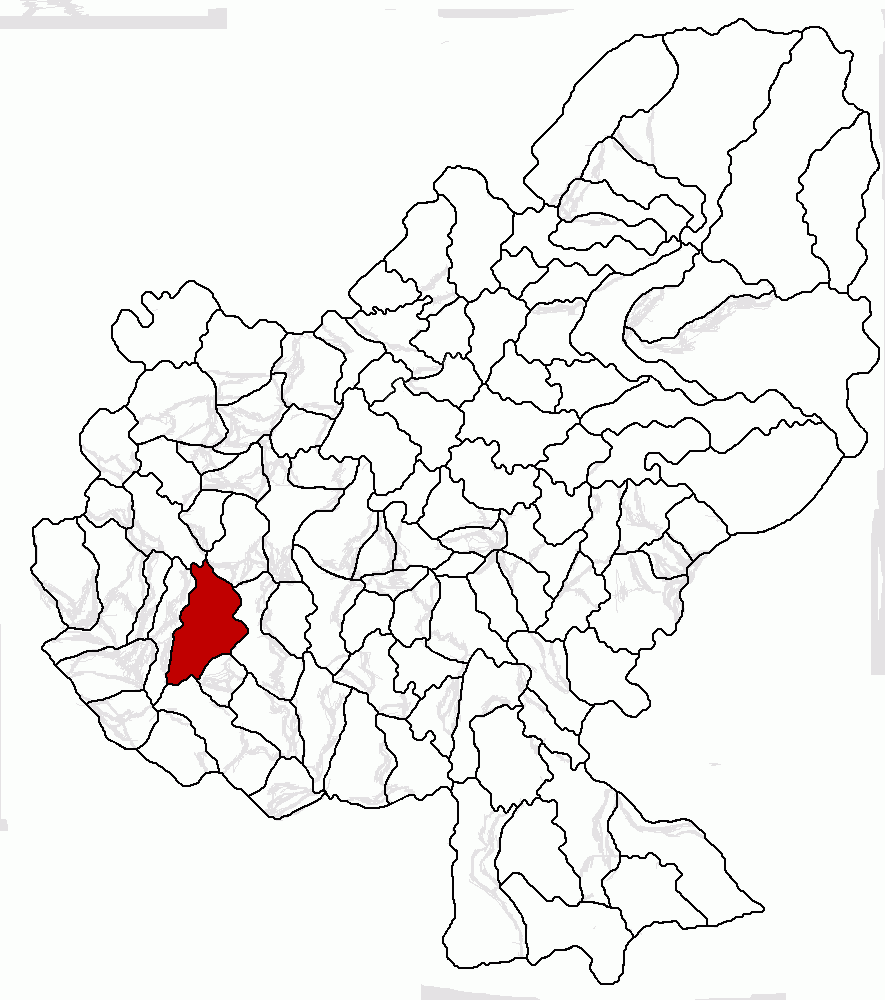 Categorie:Hărţi ale judeţului Mureş